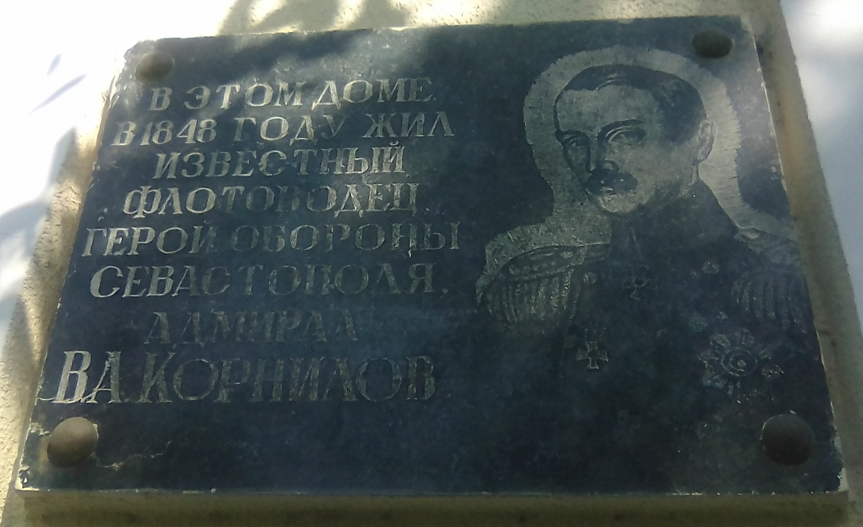 Мемориальная доска Корнилову Владимиру Алексеевичу, установленная на доме 16/4 по ул. Артиллерийской в г. Николаеве (Украина)